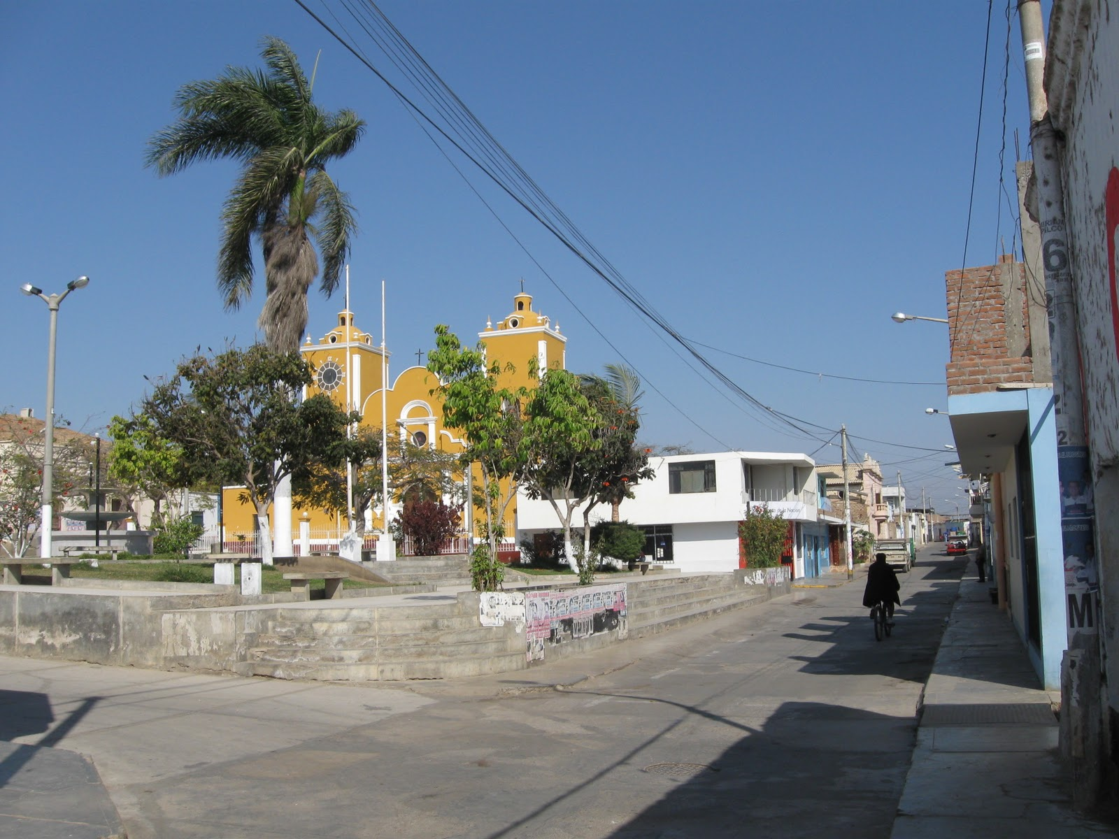 plazadearmassanjosepacasmayo